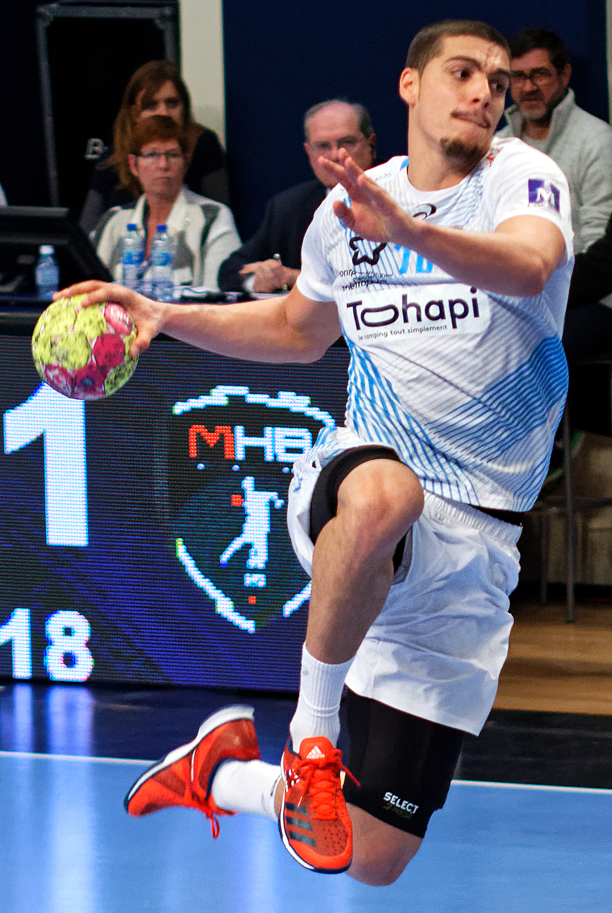 Rencontre de championnat entre le PSG et Montpellier. A Coubertin le 23 novembre 2016.